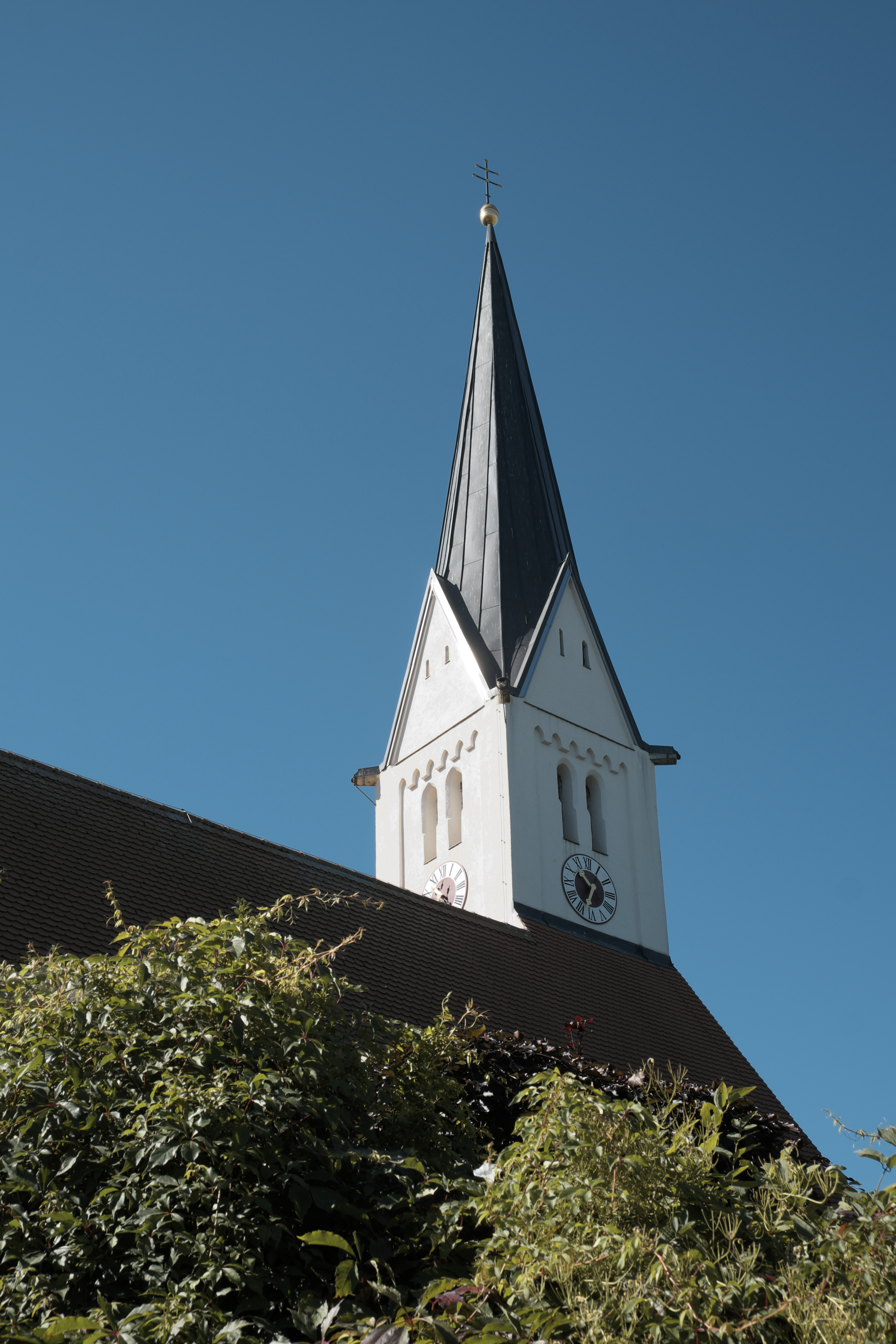 Katholische Pfarrkirche St. Johannes der Täufer in Rott im Landkreis Landsberg am Lech (Bayern/Deutschland), im Kern romanischer Westturm